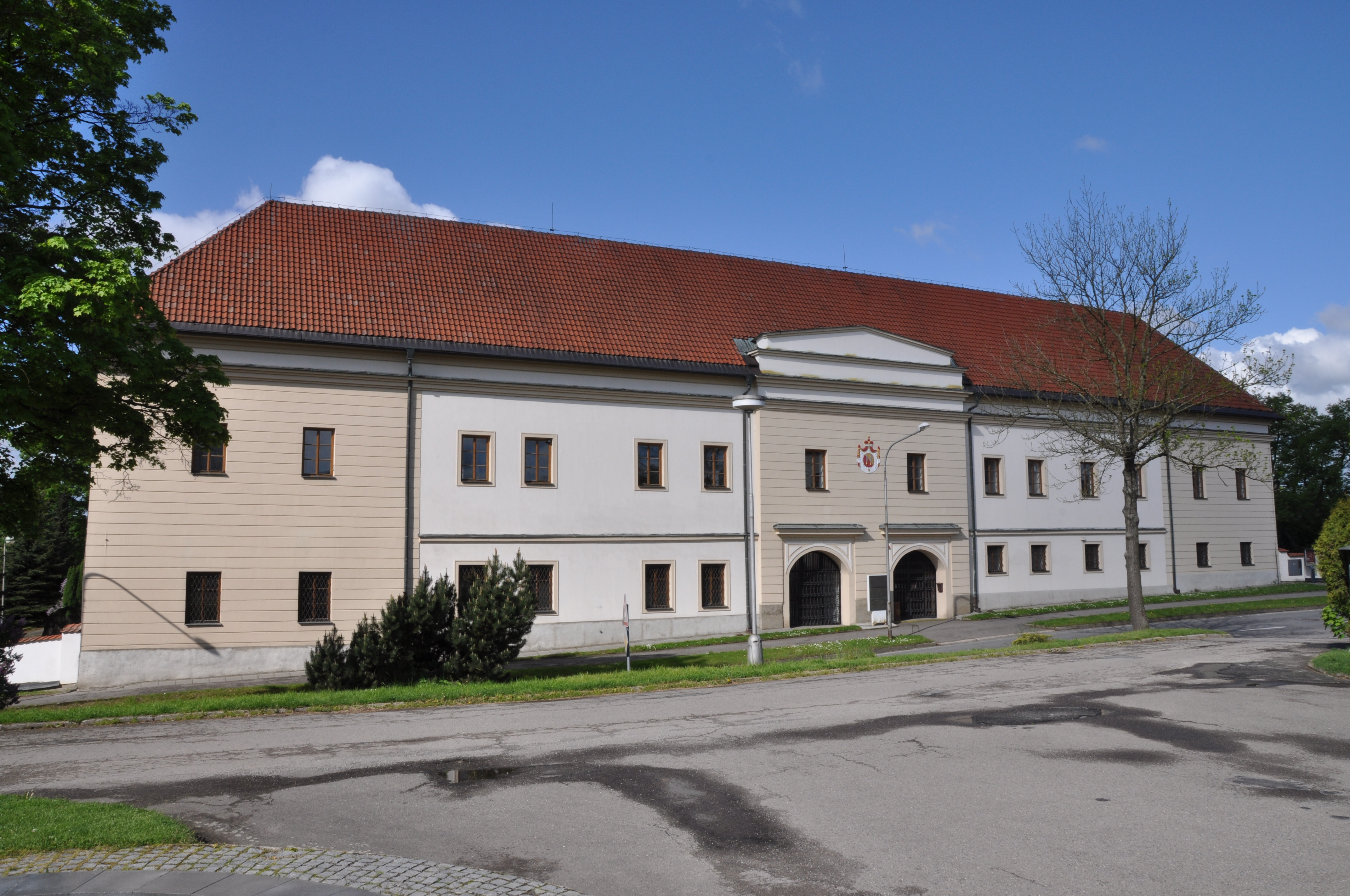 Přibyslav, zámek, pohled od východu.